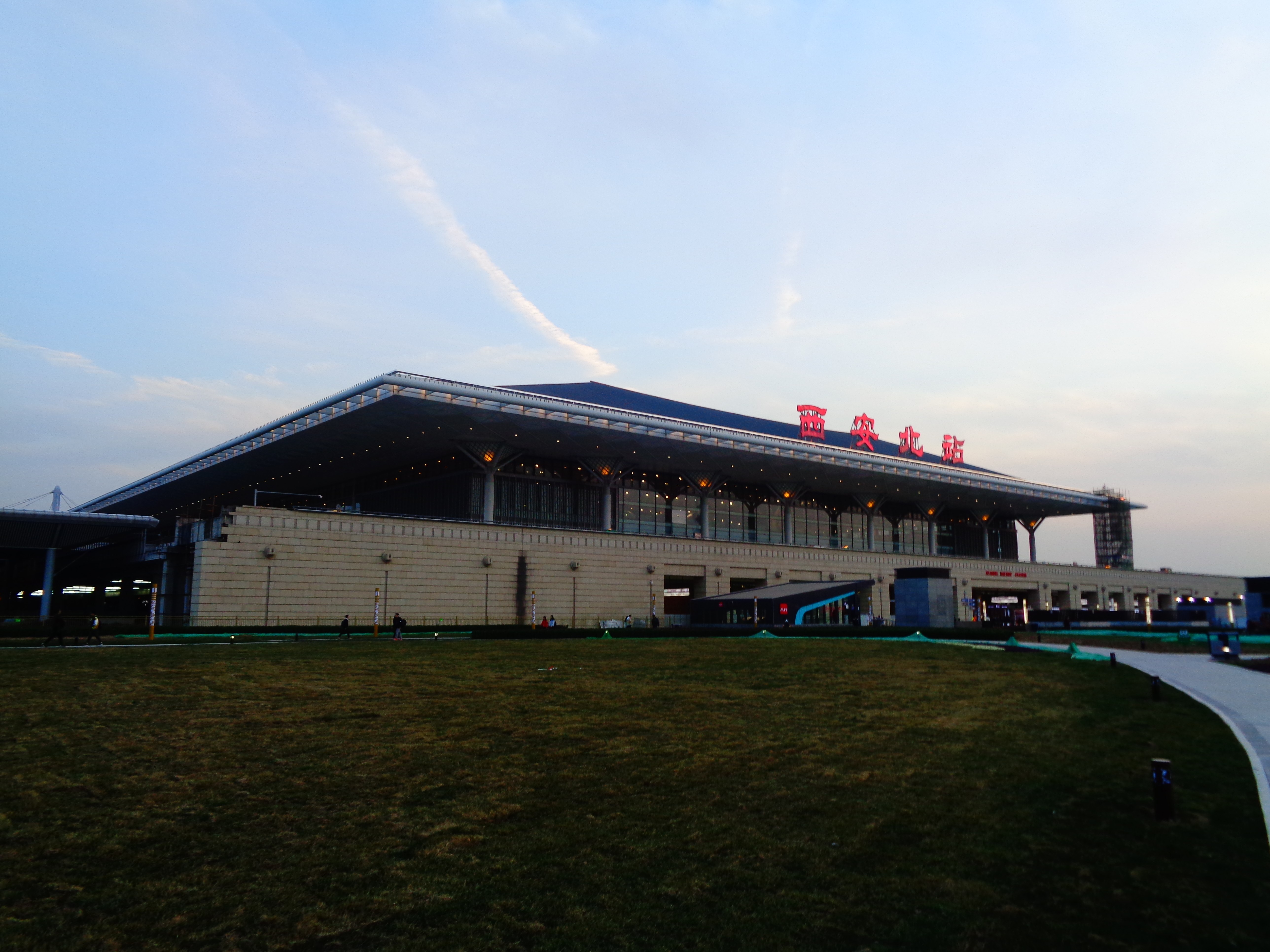 西安市未央区西安北站北站房